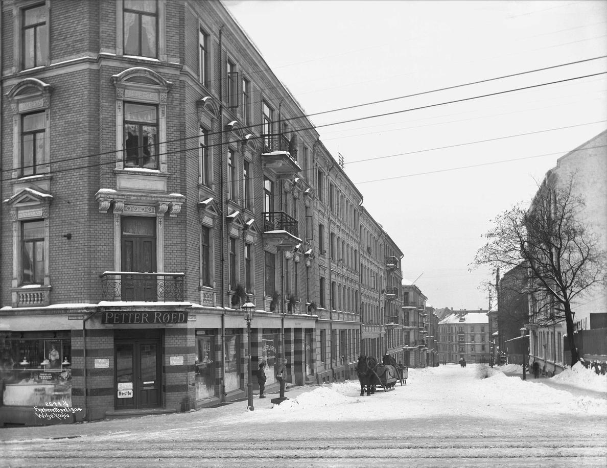 Niels Juels gate fra Briskebyveien. Til venstre er Uraniagården (Niels Juels gate 51), mens dagens Niels Juels gate 70 ennå ikke er oppført på høyresiden. Foto: Anders Beer Wilse, 1904. Fra Byhistorisk samling hos Oslo Museum.